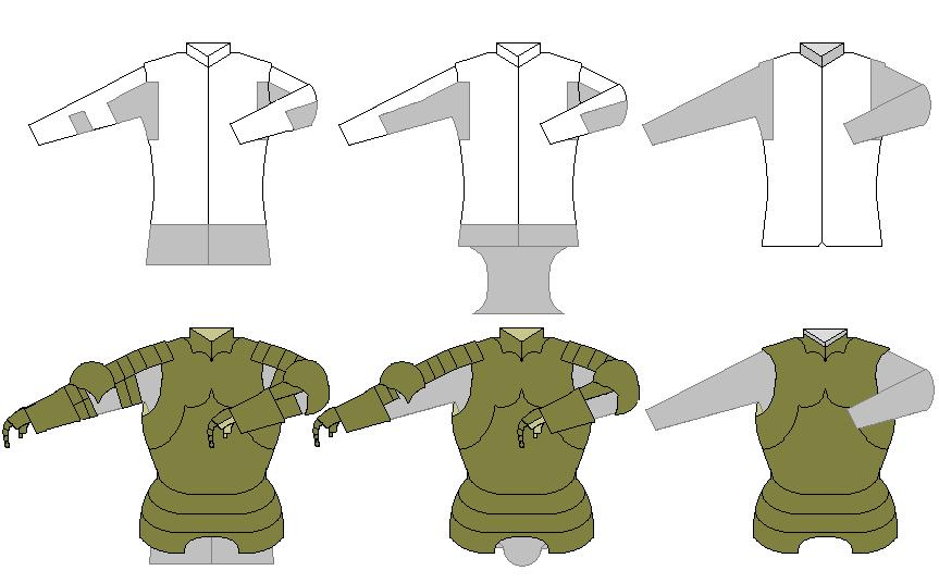 Disposition courant des gouset (renfort métalic souple) sur un gambison Provision running of the gouset (flexible reinforcement métalic) on a gambison